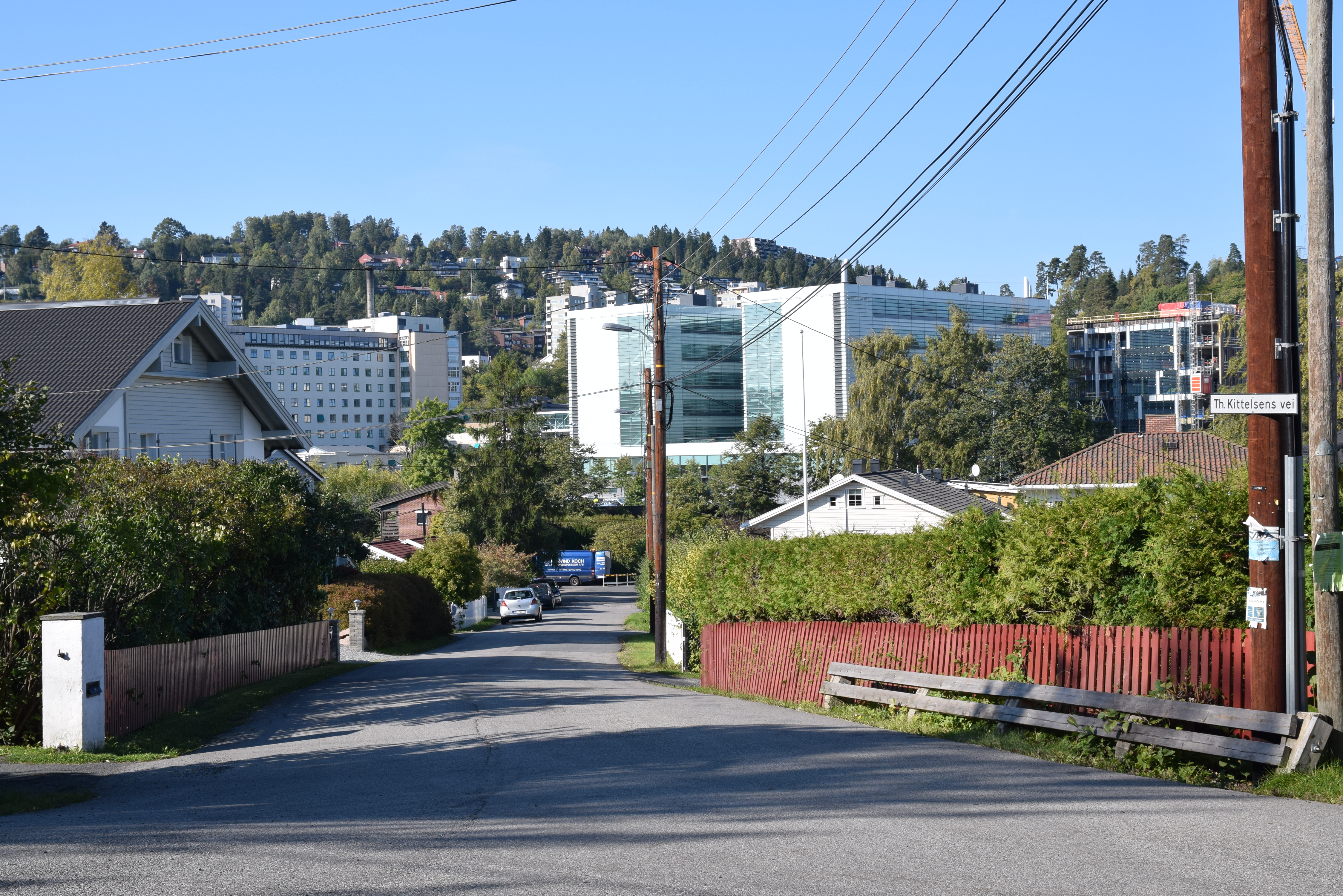 Th. Kittelsens vei, Ullern, Oslo, sett fra Abbedikollen. Radiumhospitalet og Ullernåsen i bakgrunnen